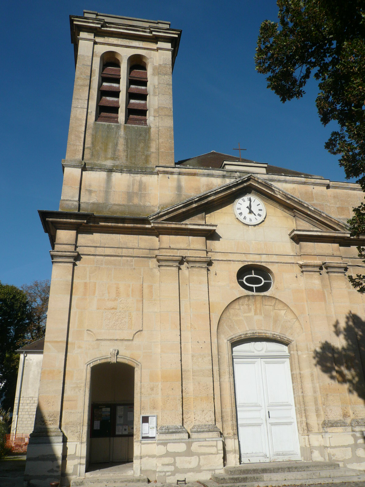 Eglise Saint-Wandrille